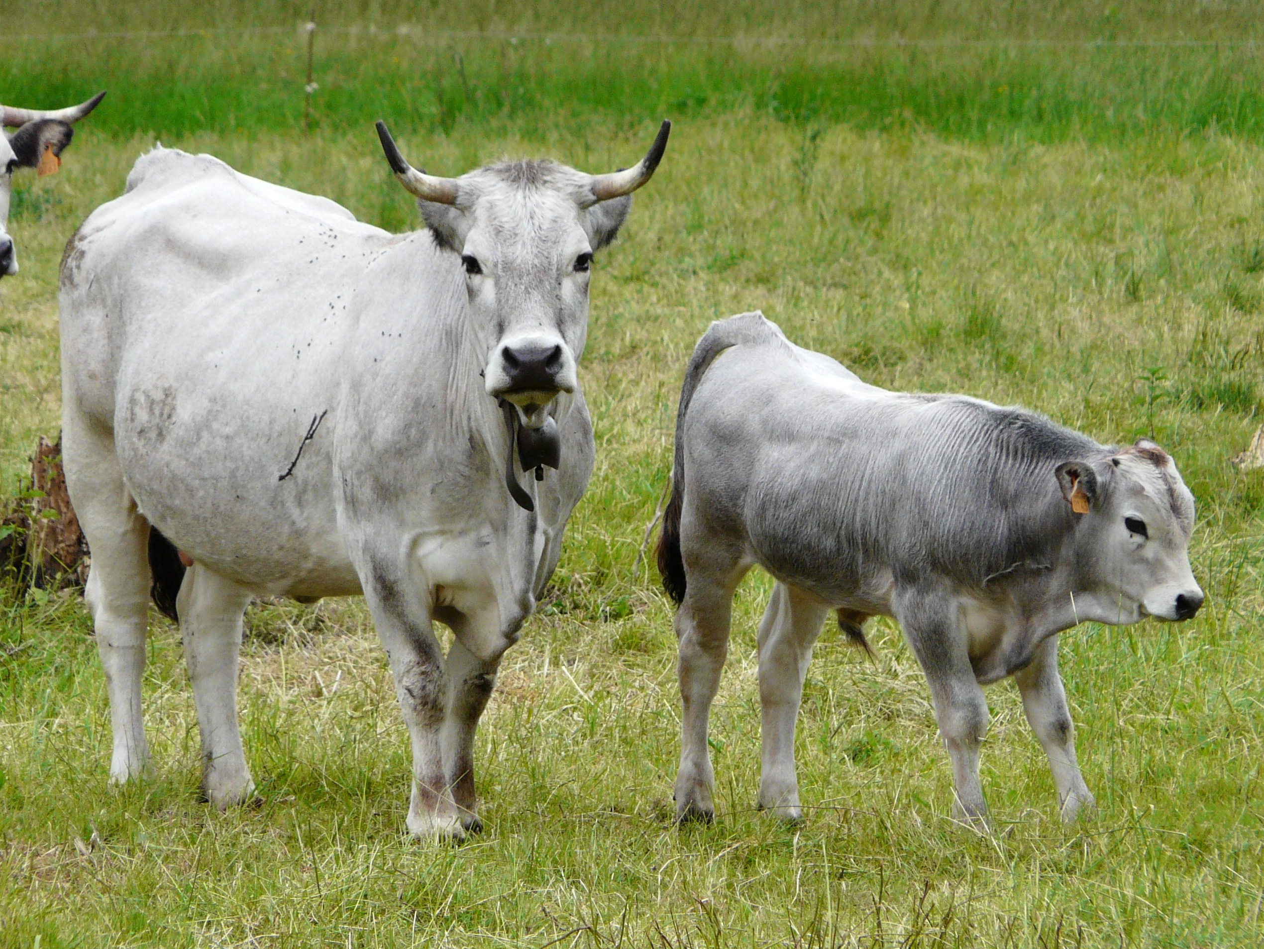 Vache et veau de la race gasconne à Antignac, Haute-Garonne, France.